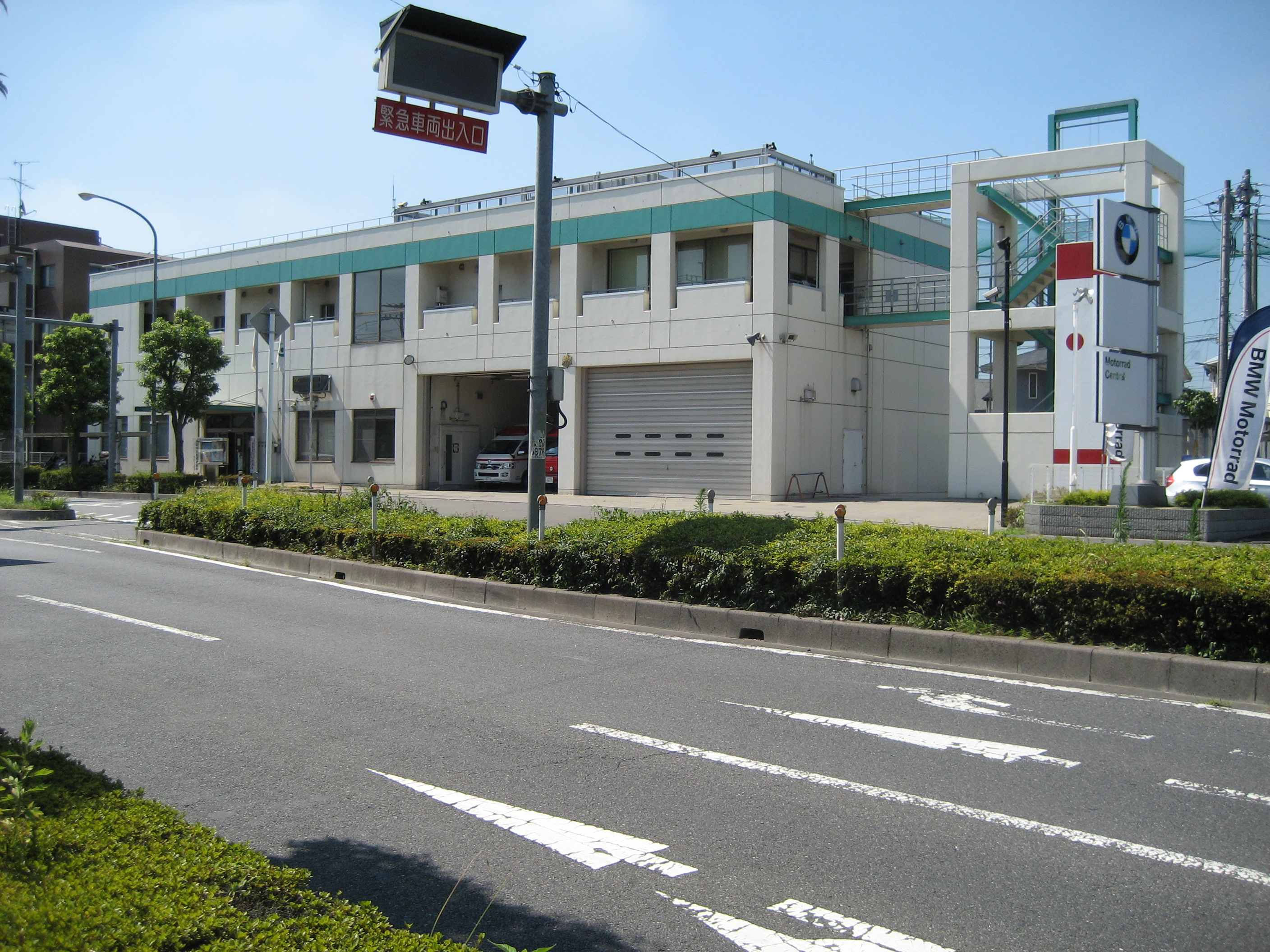 さいたま市消防局南消防署東浦和出張所庁舎